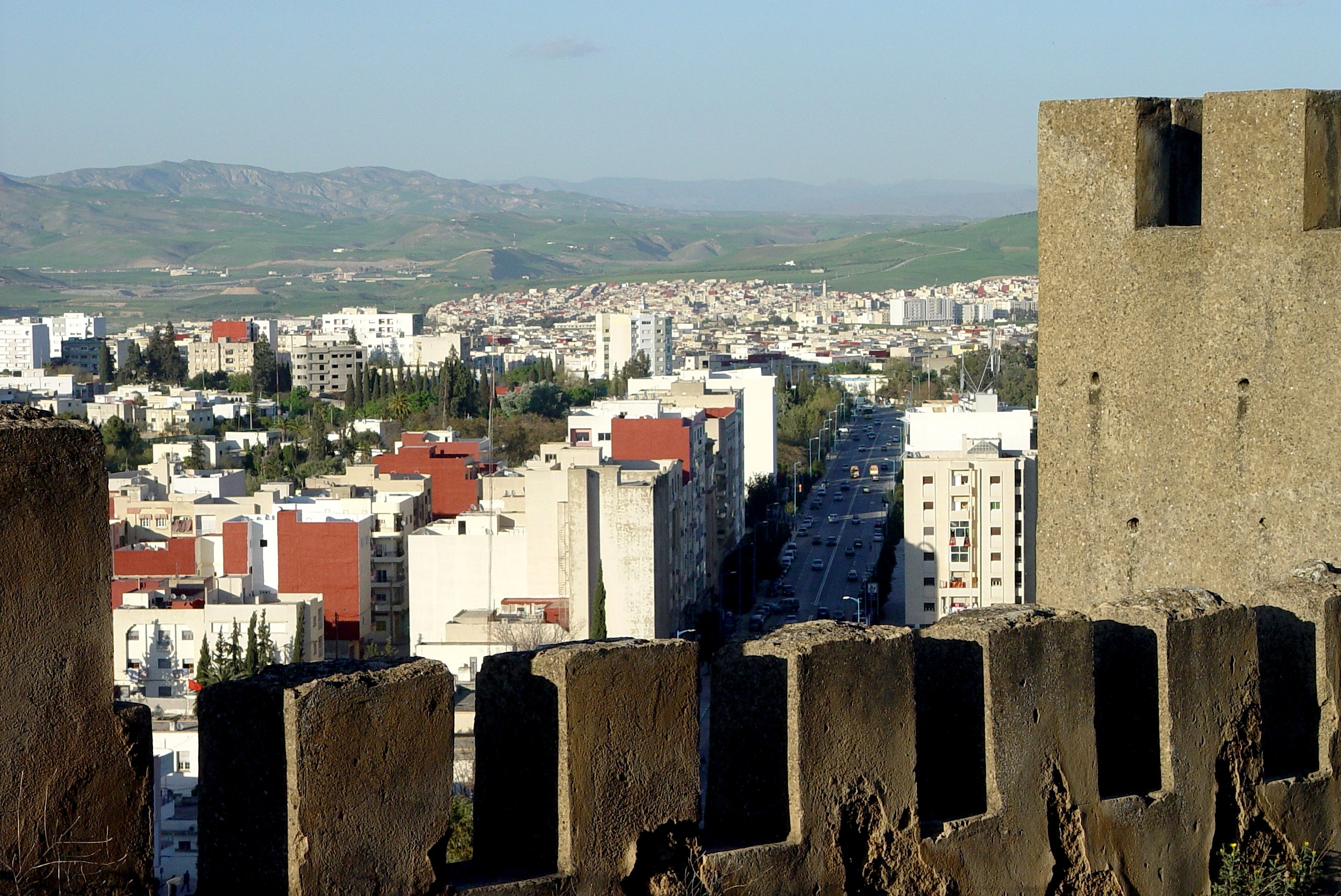 Une vue depuis Taza haut